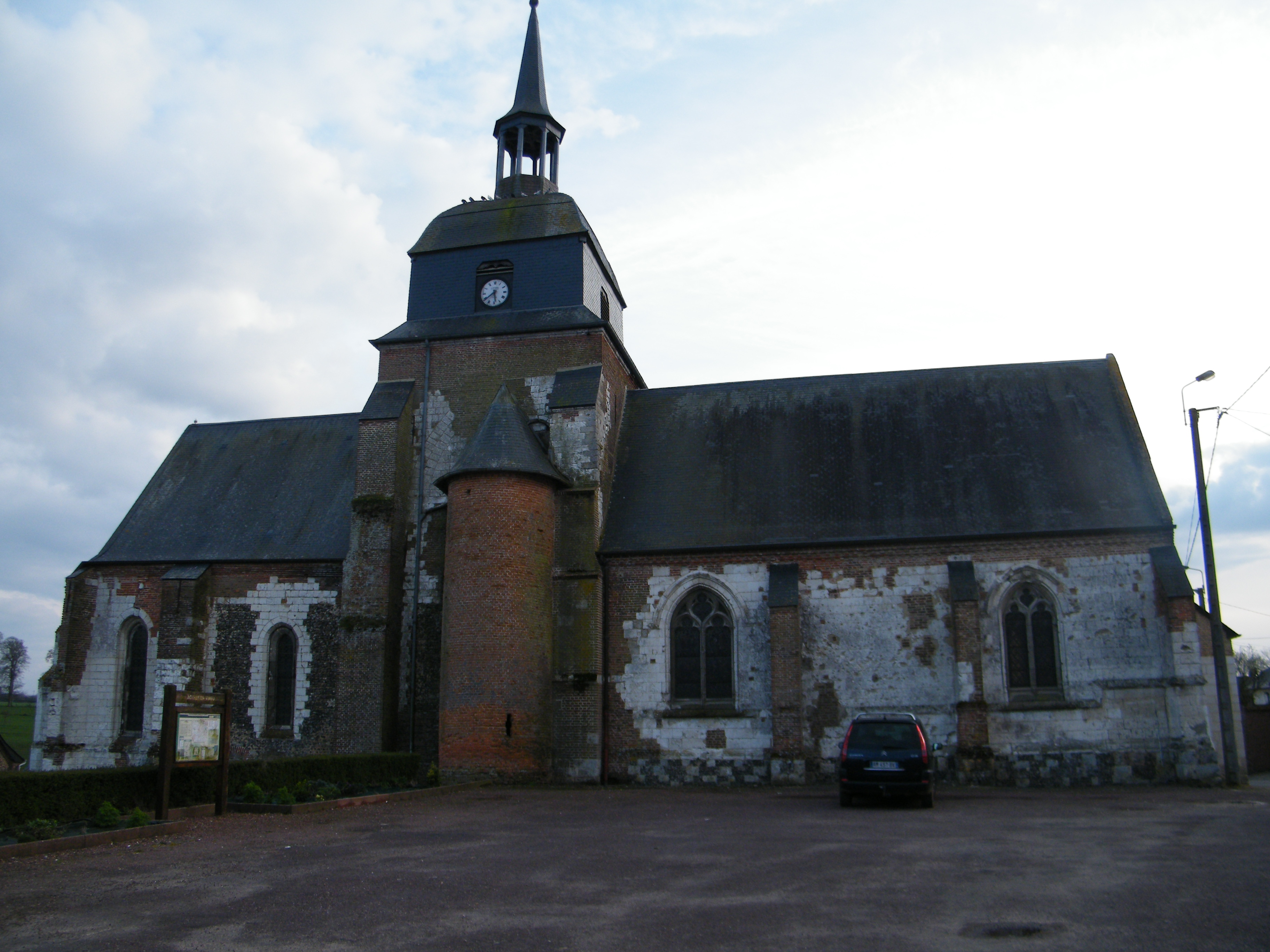 L'église, côté nord.